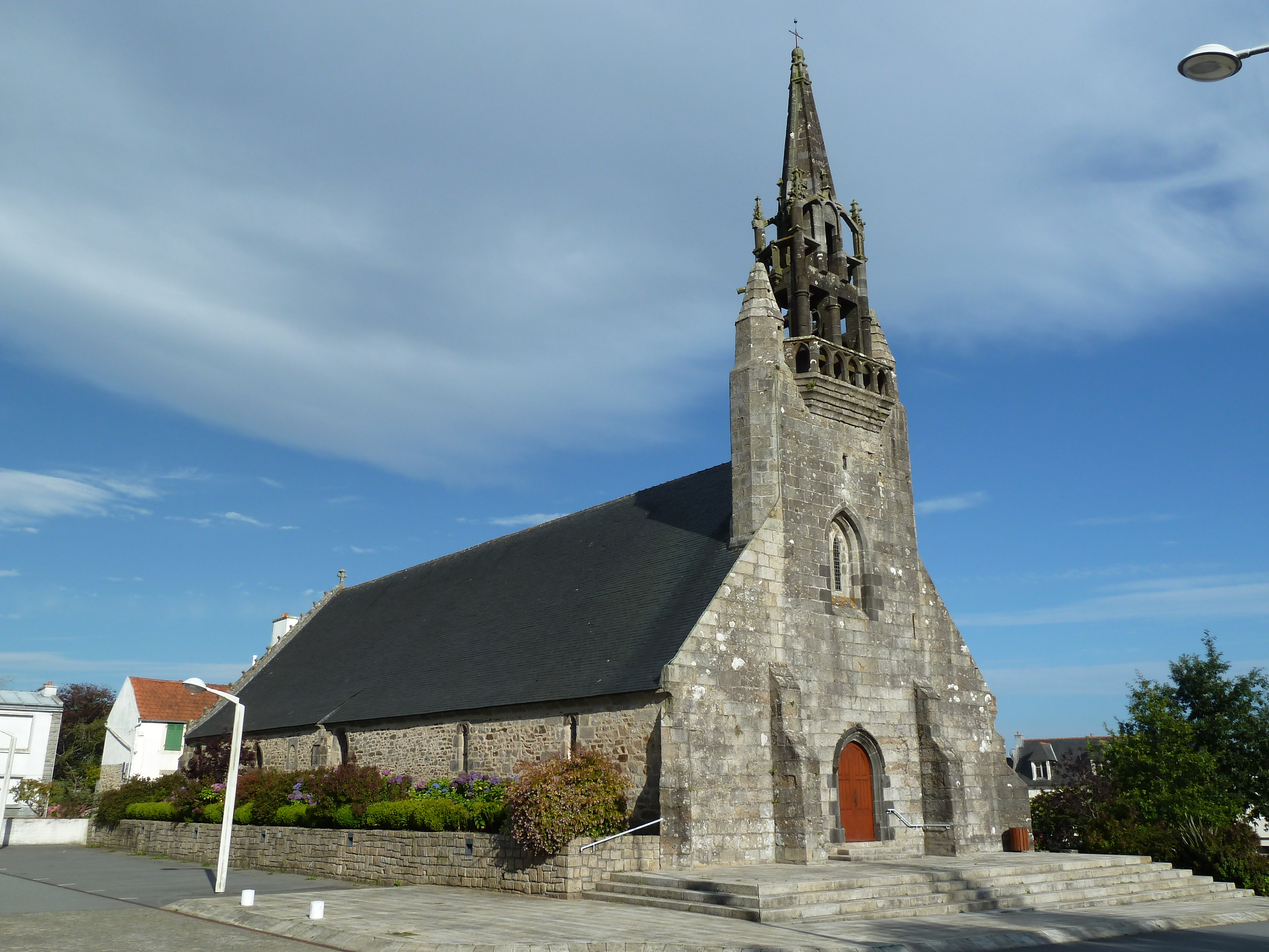 La chapelle Notre-Dame du Rheun de Guipavas